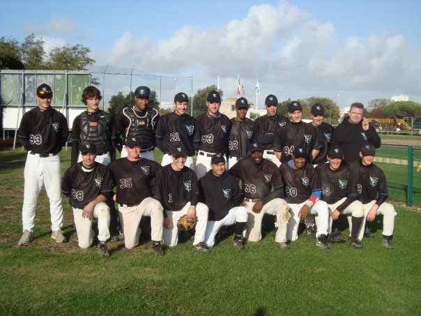 équipe de baseball de compiègne championne de france N1 2009